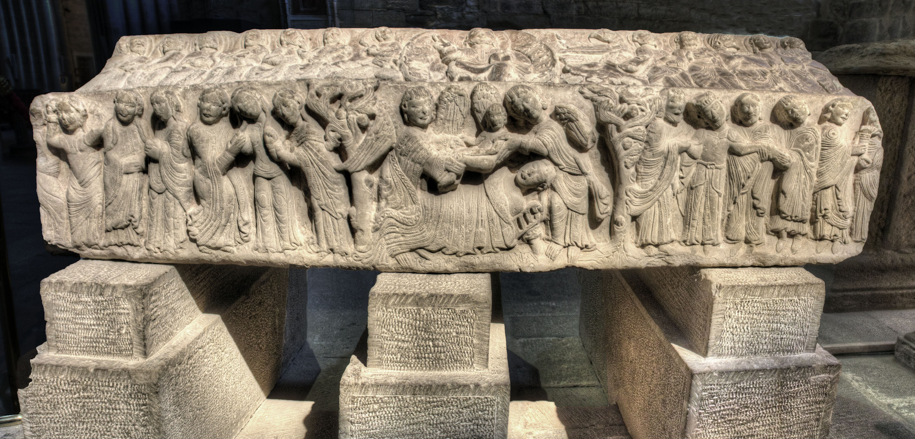 En el Monasterio de Santa María la Real, en Nájera, se conserva el sarcófago de Blanca Garcés de Navarra, reina consorte de Castilla por su matrimonio con Sancho III. Blanca murió de parto en 1156 a los 19 años. Su hijo sobrevivió y reinó como Alfonso VIII de Castilla.